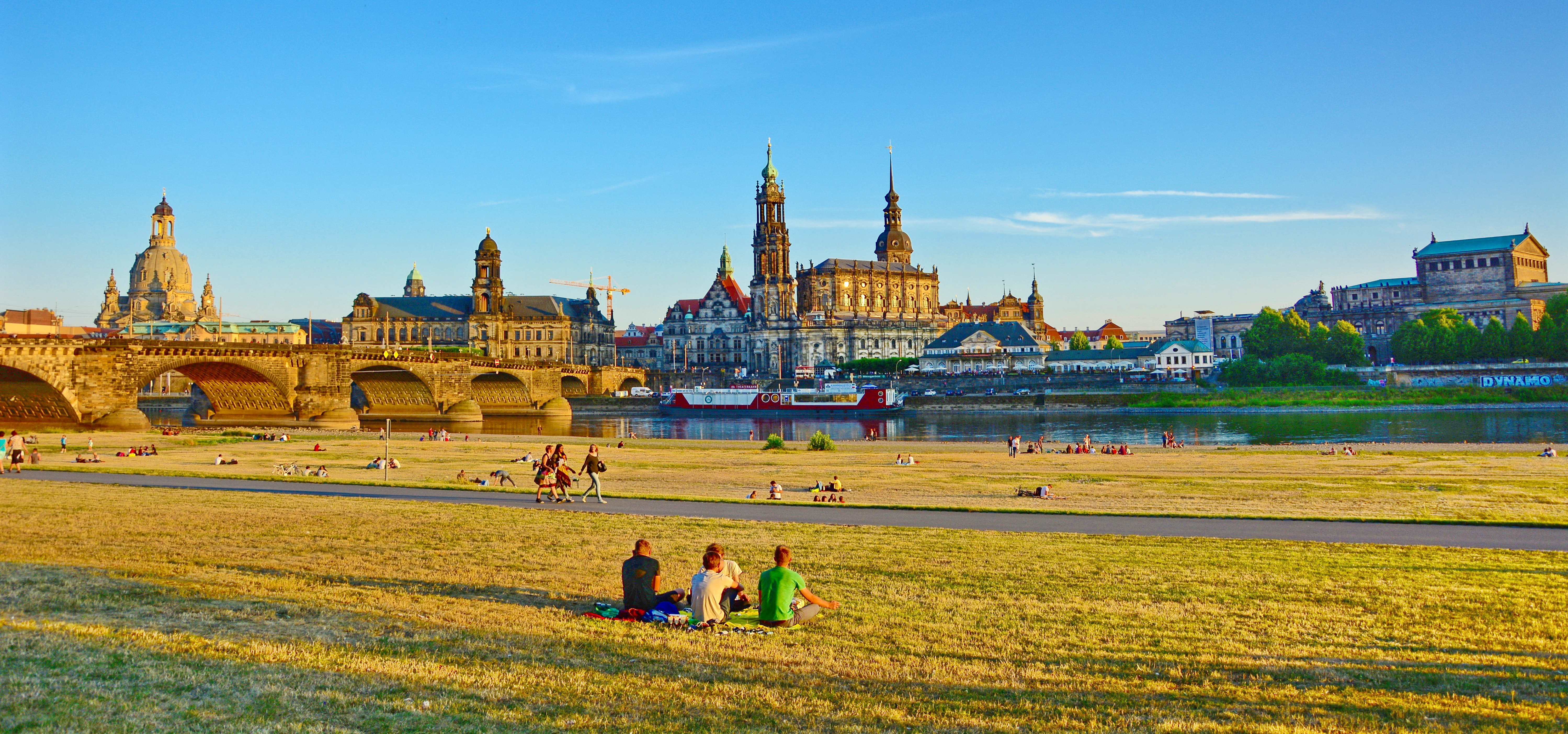 Dresden